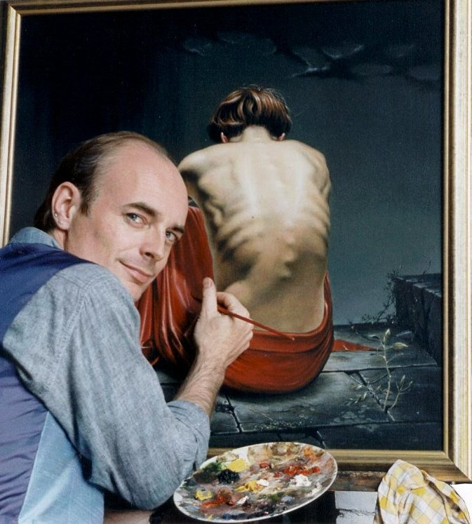 Maurice Heerdink